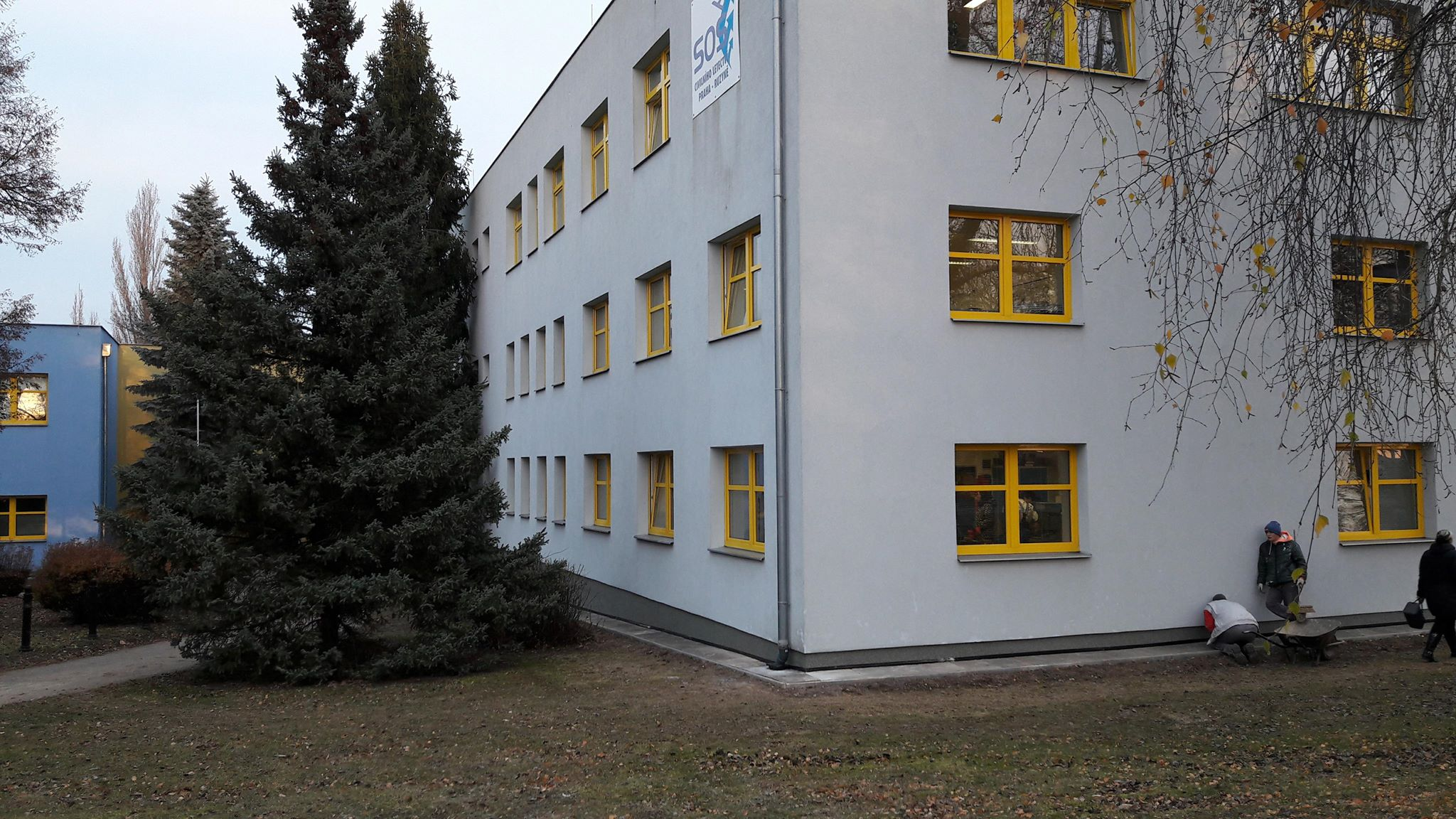 Budova Střední odborné školy civilního letectví, K Letišti 278/4a, Praha-Ruzyně.